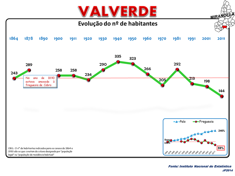 Evolução da População 1864 / 2011